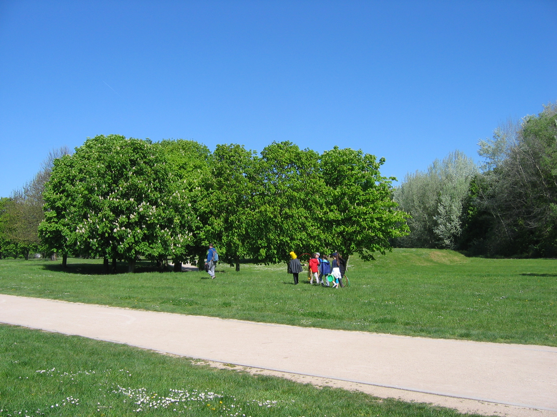 Base de plein air et de loisirs du Port-aux-Cerises